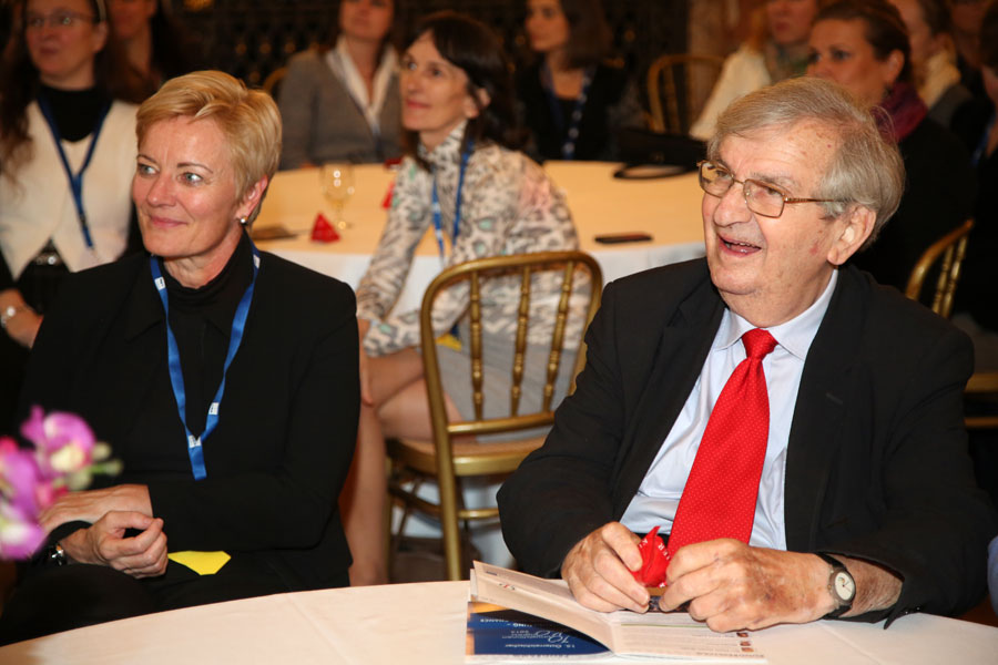 Ingrid Deltenre, Ari Rath